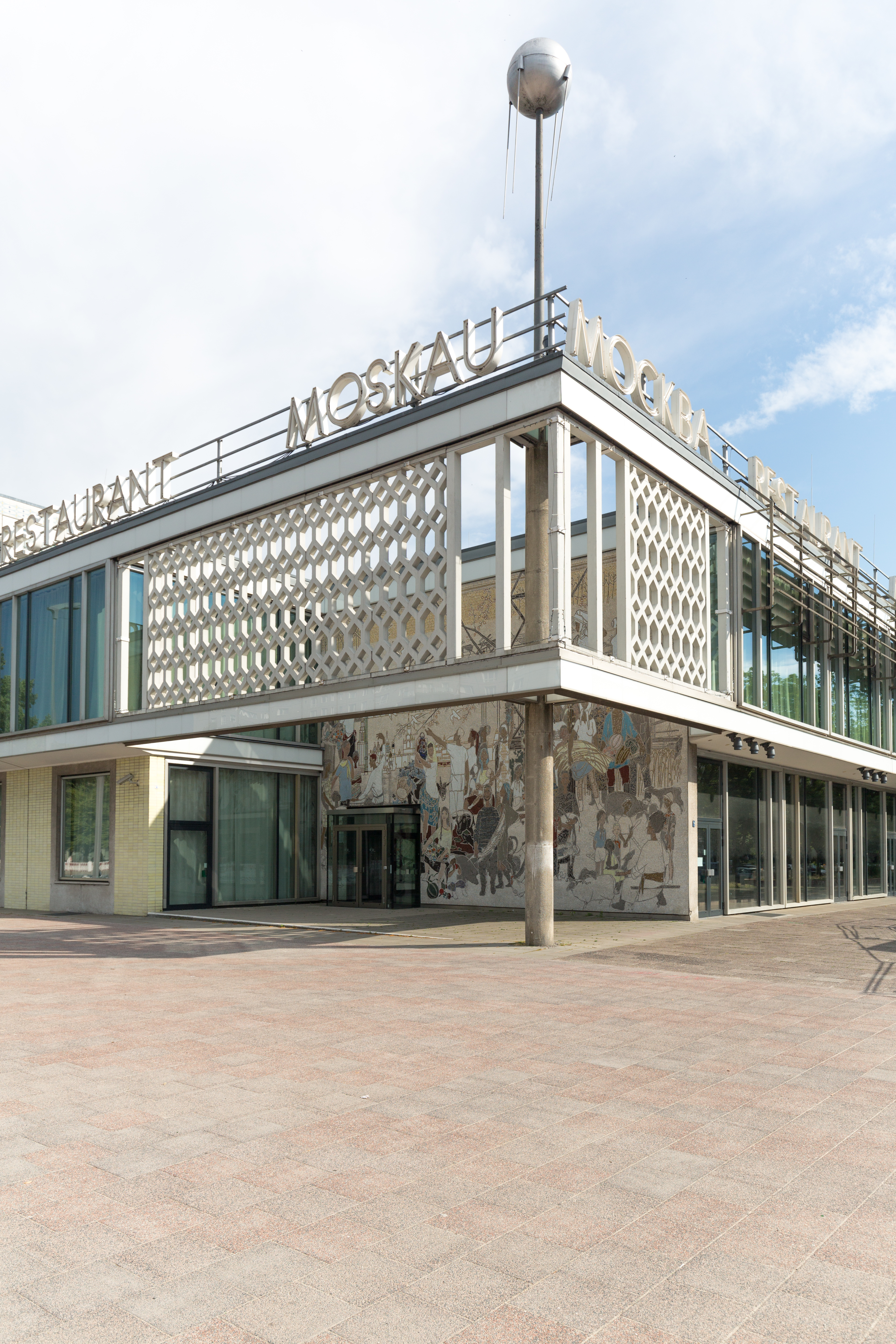 Blick auf das Café Moskau von der Karl-Marx-Allee/Schillingstraße.